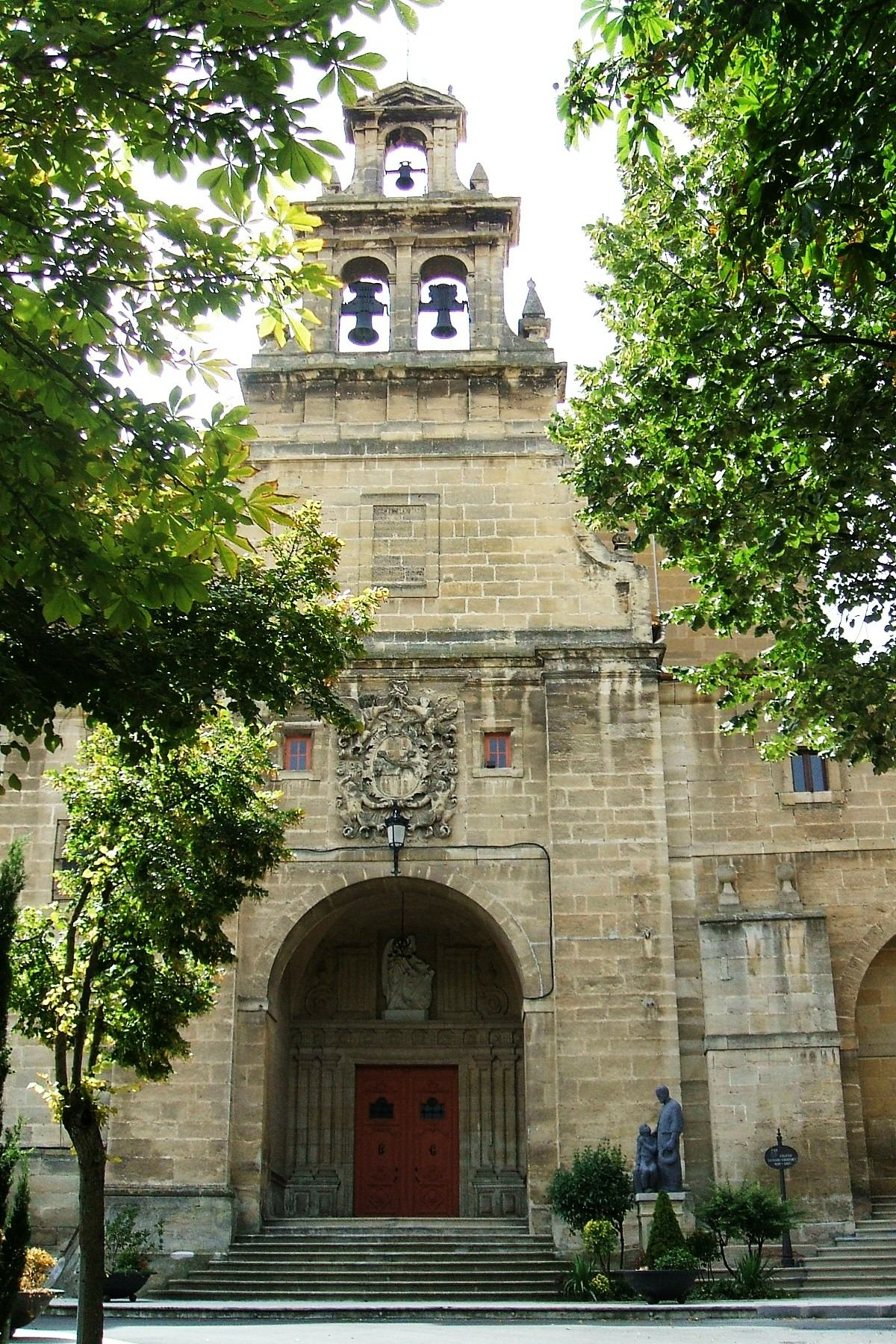 Fachada de la Iglesia del antiguo Convento/Colegio de los Sagrados Corazones, Miranda de Ebro (Burgos)